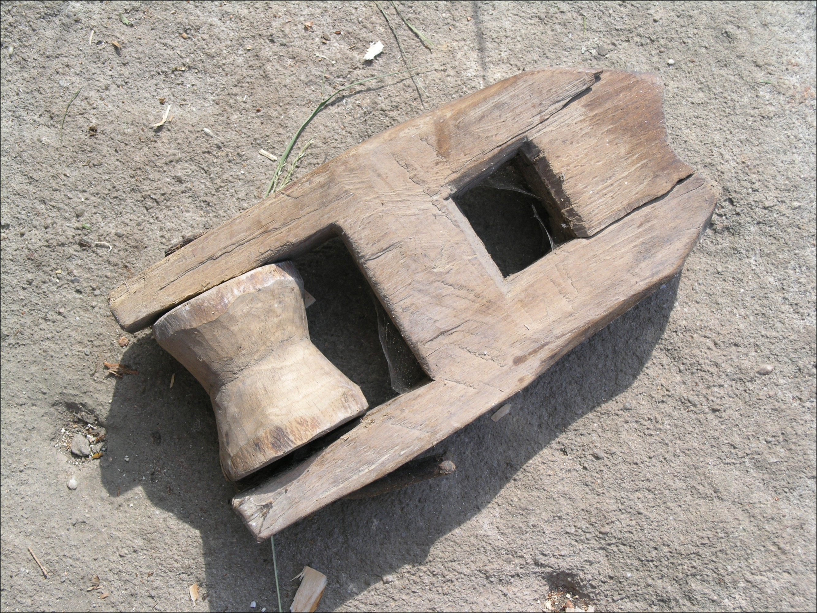 Stará dřevěná kladka